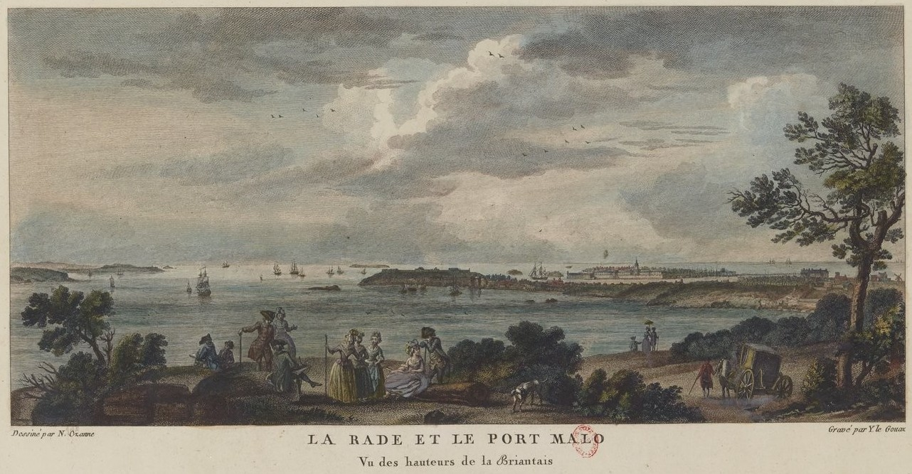 Planche tirée des Nouvelles vues perspectives des ports de France dessinées pour le Roi par M. Ozanne. Gravées par Y. Le Gouaz en 1776.